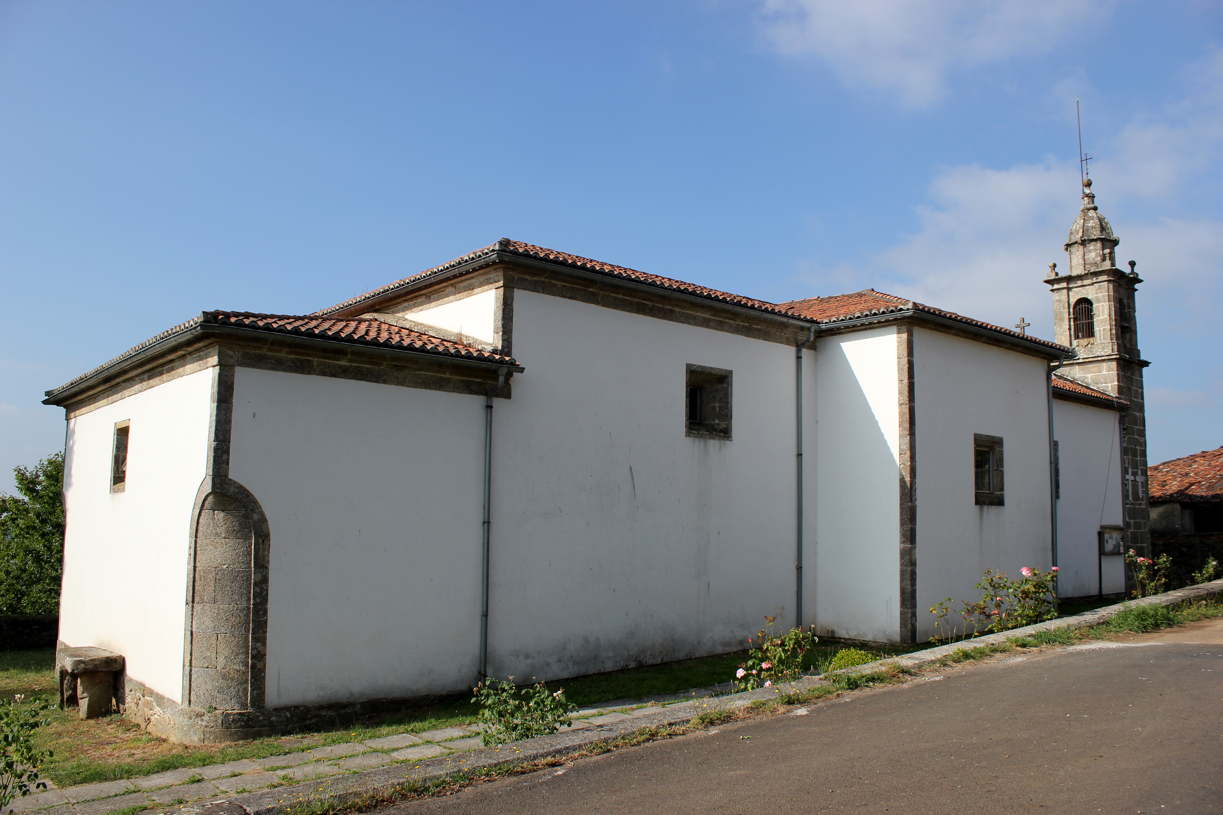 Igrexa do Eixo, Santiago de Compostela.